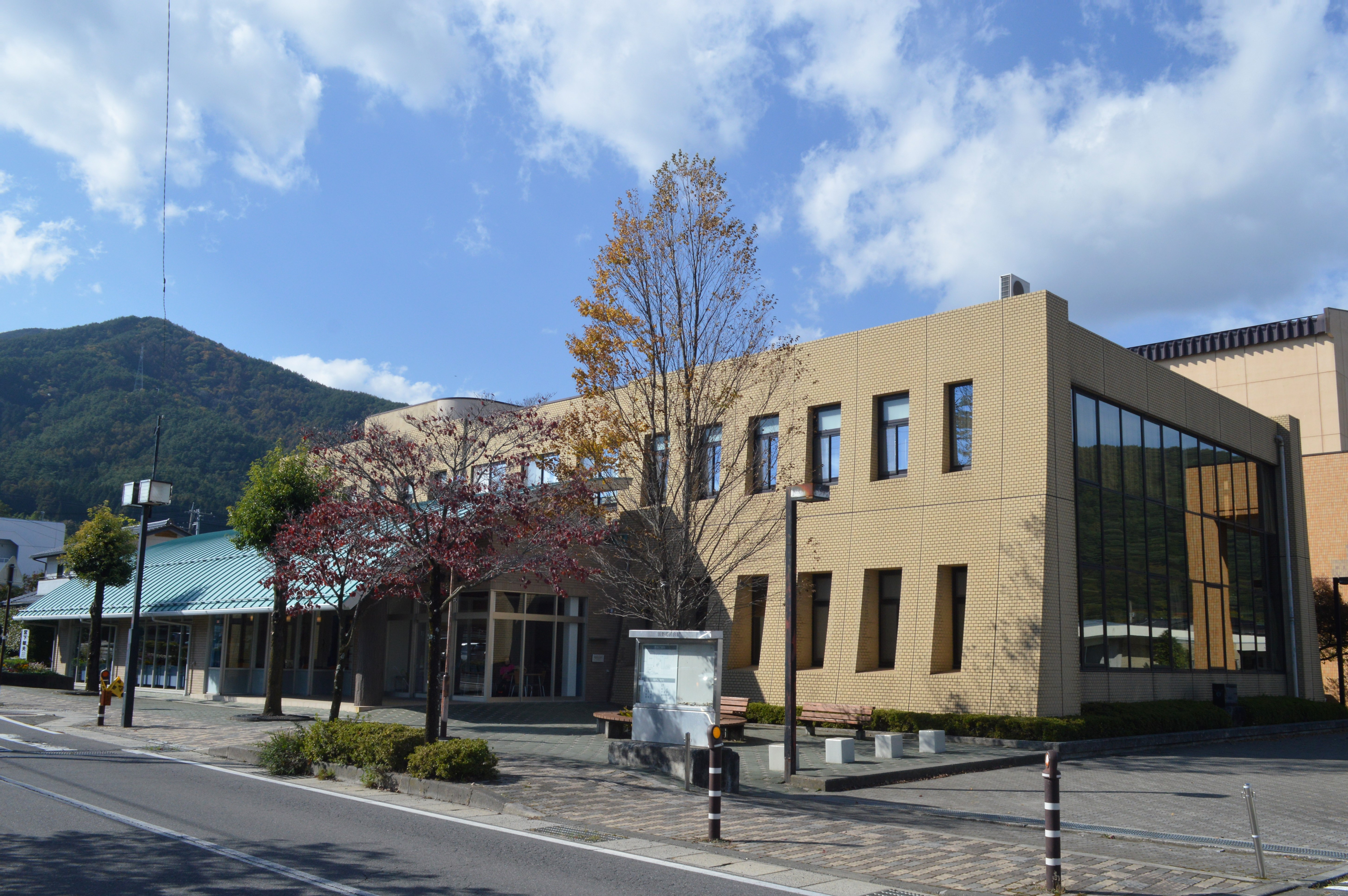 長野県上伊那郡辰野町の辰野町立辰野図書館。